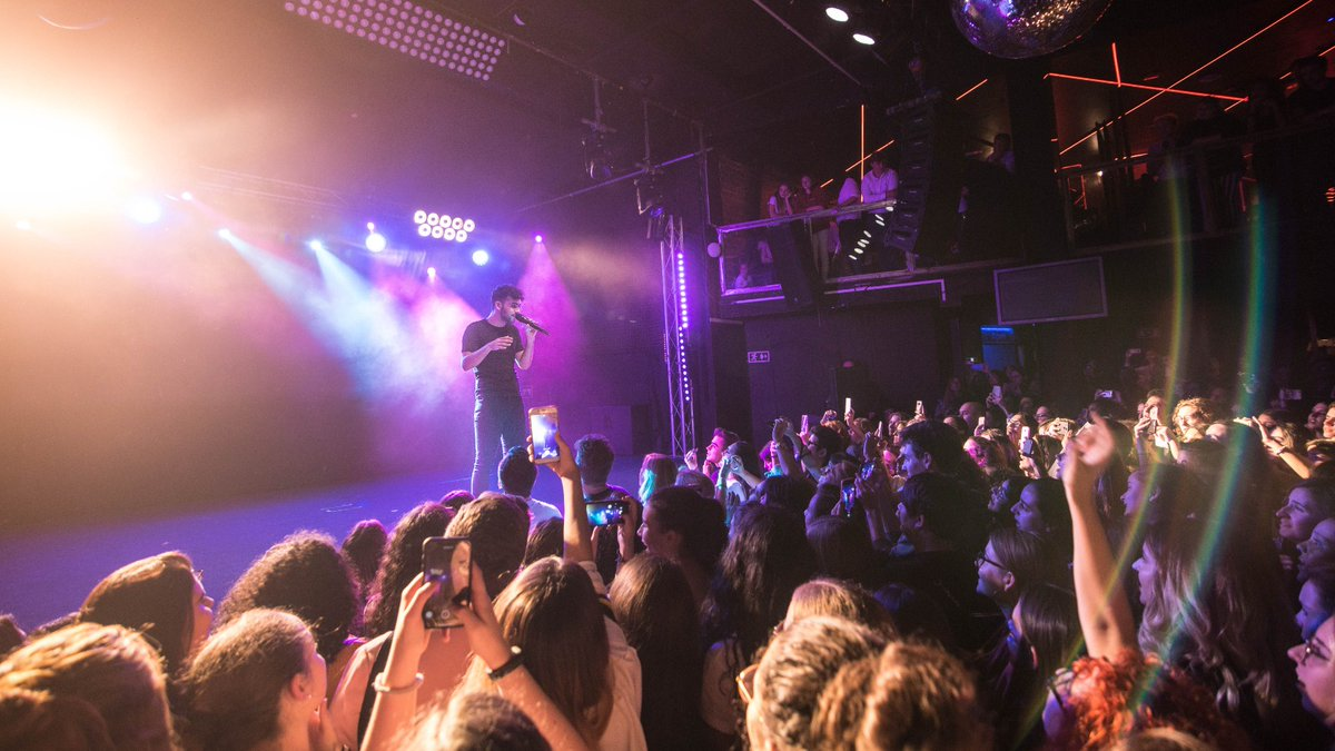 Concierto de Agoney Hernández Morales en la Sala But en Madrid 1 de noviembre de 2018 15